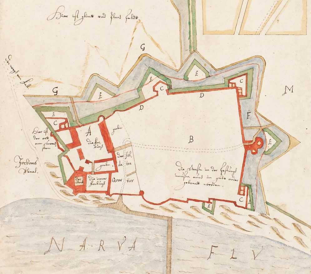 Narva linnamüür 1600. aasta rootsi linnaplaanil